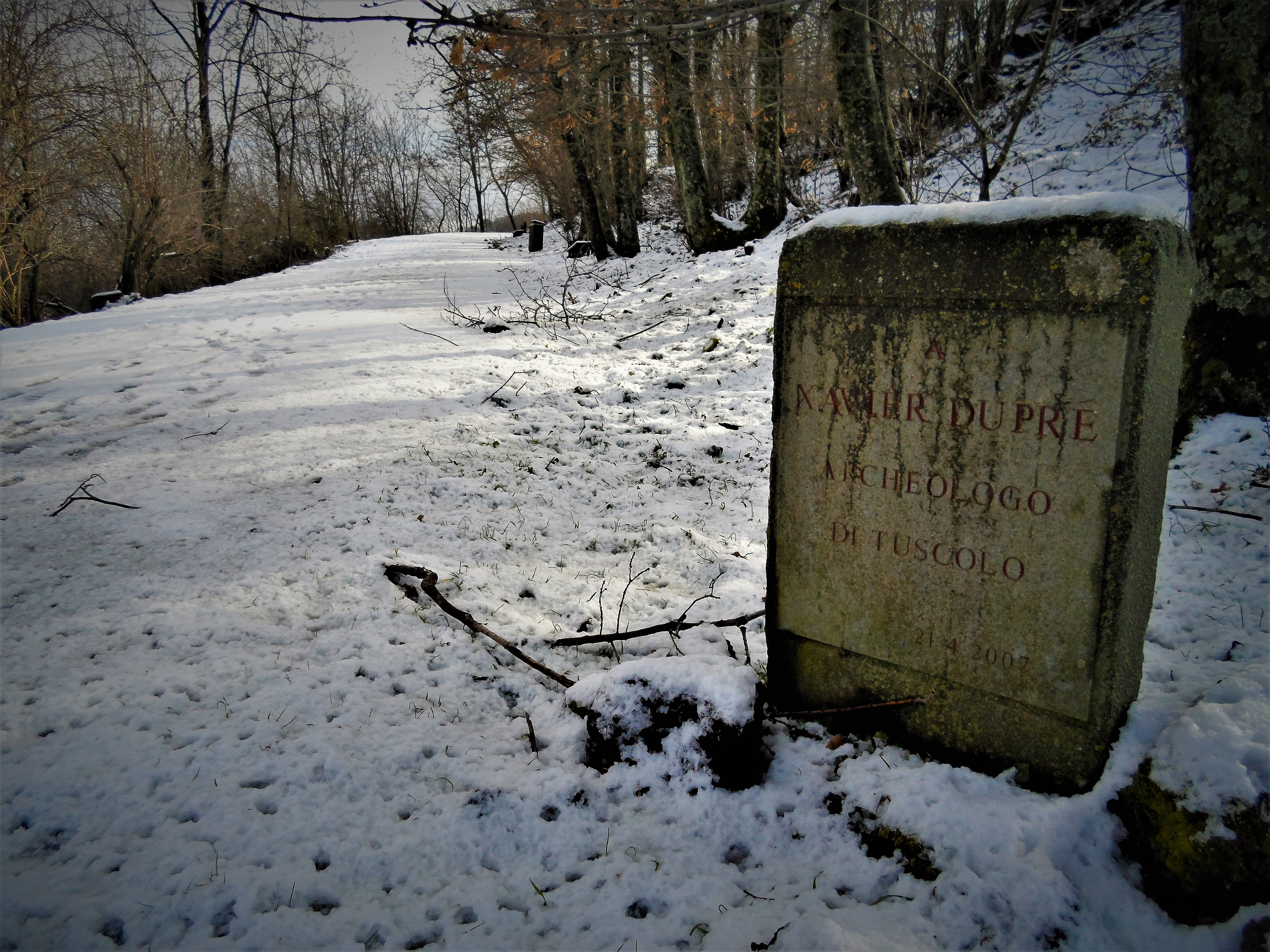 Làpida monument a Xavier Dupré al camí d'accés al jaciment de Tusculum